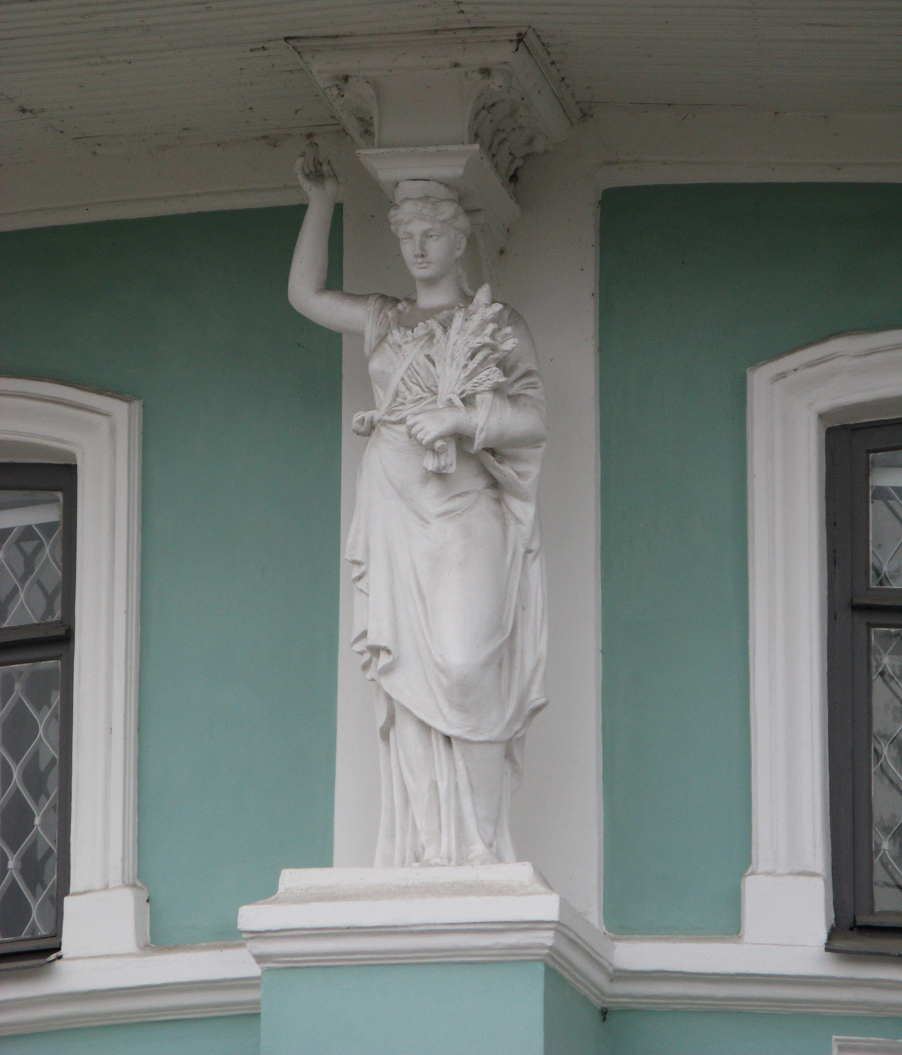 Земська управа (Будинок, пов'язаний з революційними подіями 1905 року) (мур.), Суми, вул. Г. Кондратьєва, 2